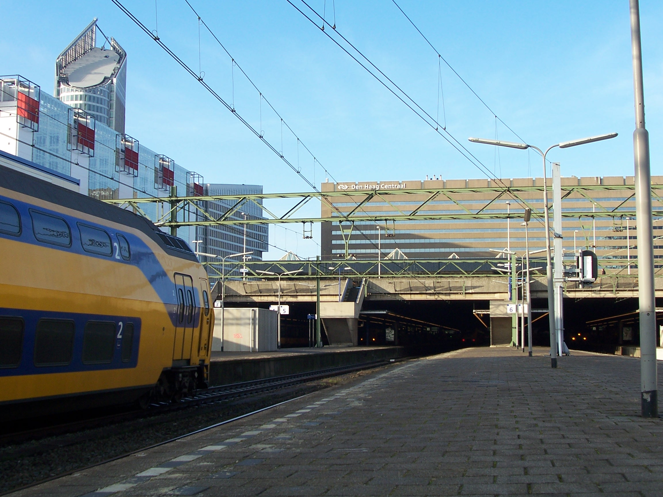 Den Haag Centraal